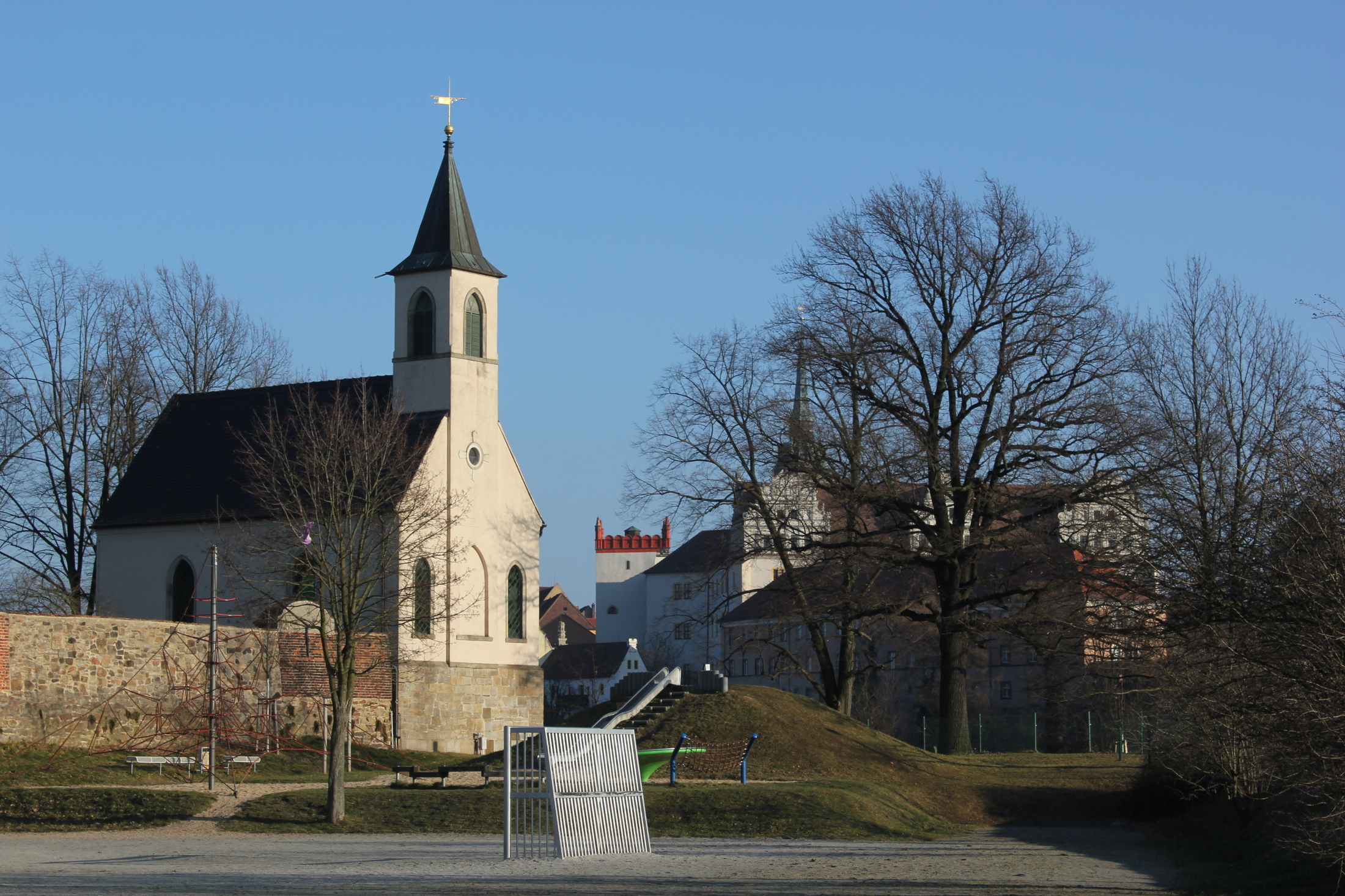 Hornjoserbsce: Kapałka na Hrodźišku w Budyšinje.